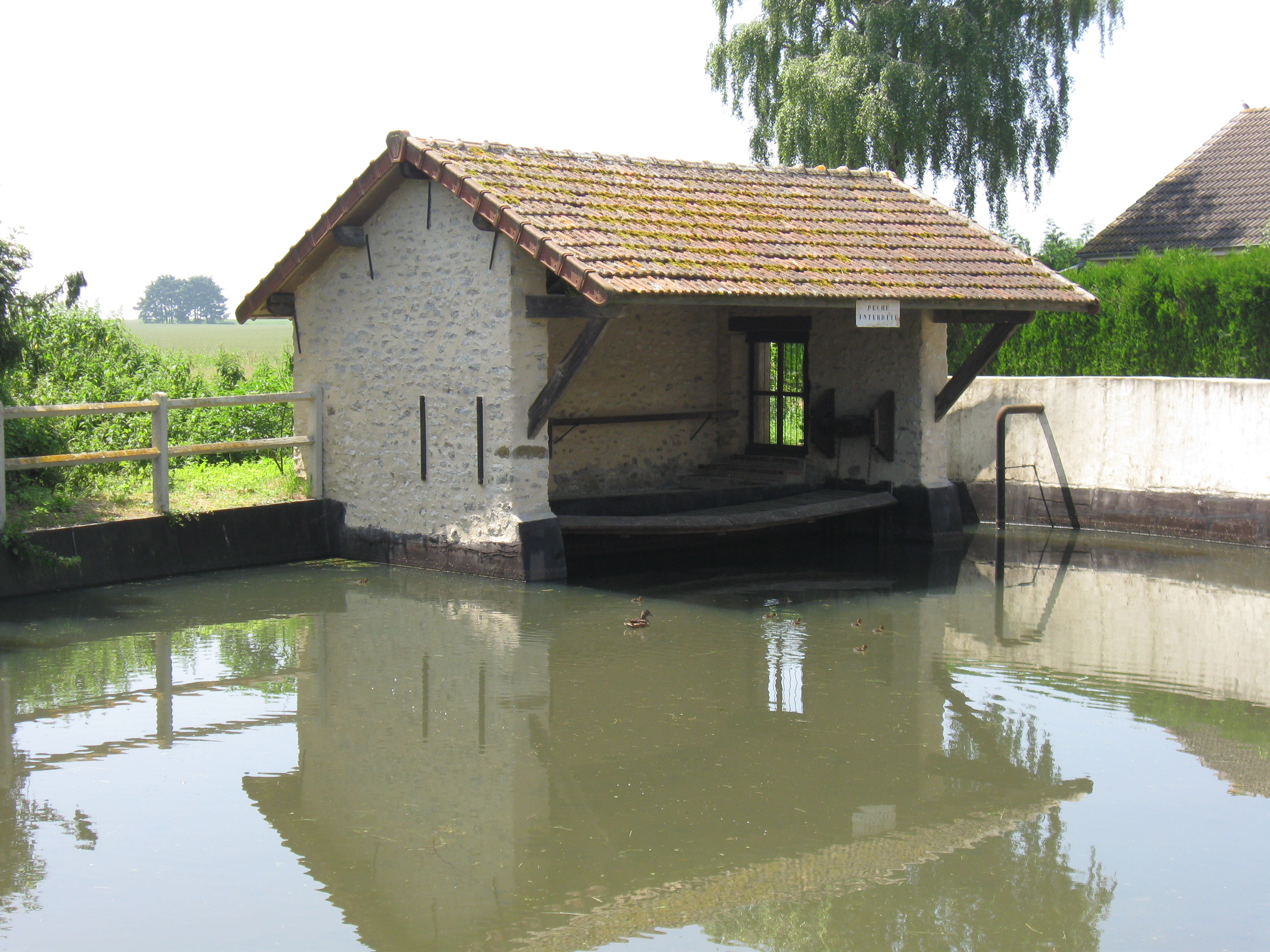 Lavoir de Cucharmoy. (Seine-et-Marne, région Île-de-France).